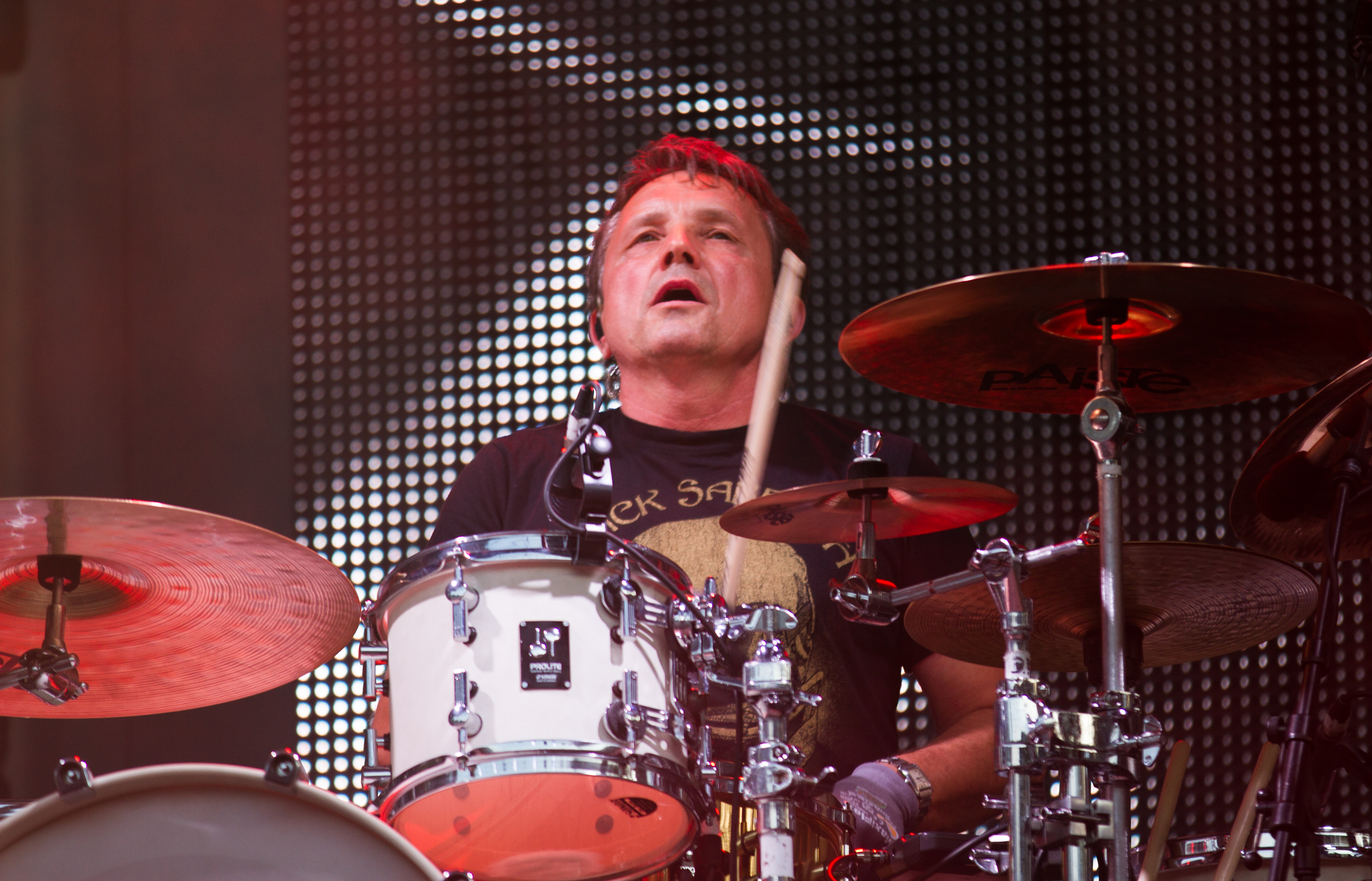 Klaus Scharfschwerdt beim "Puhdys - Das große Abschiedskonzert 2015" in der Kindl-Bühne Wuhlheide